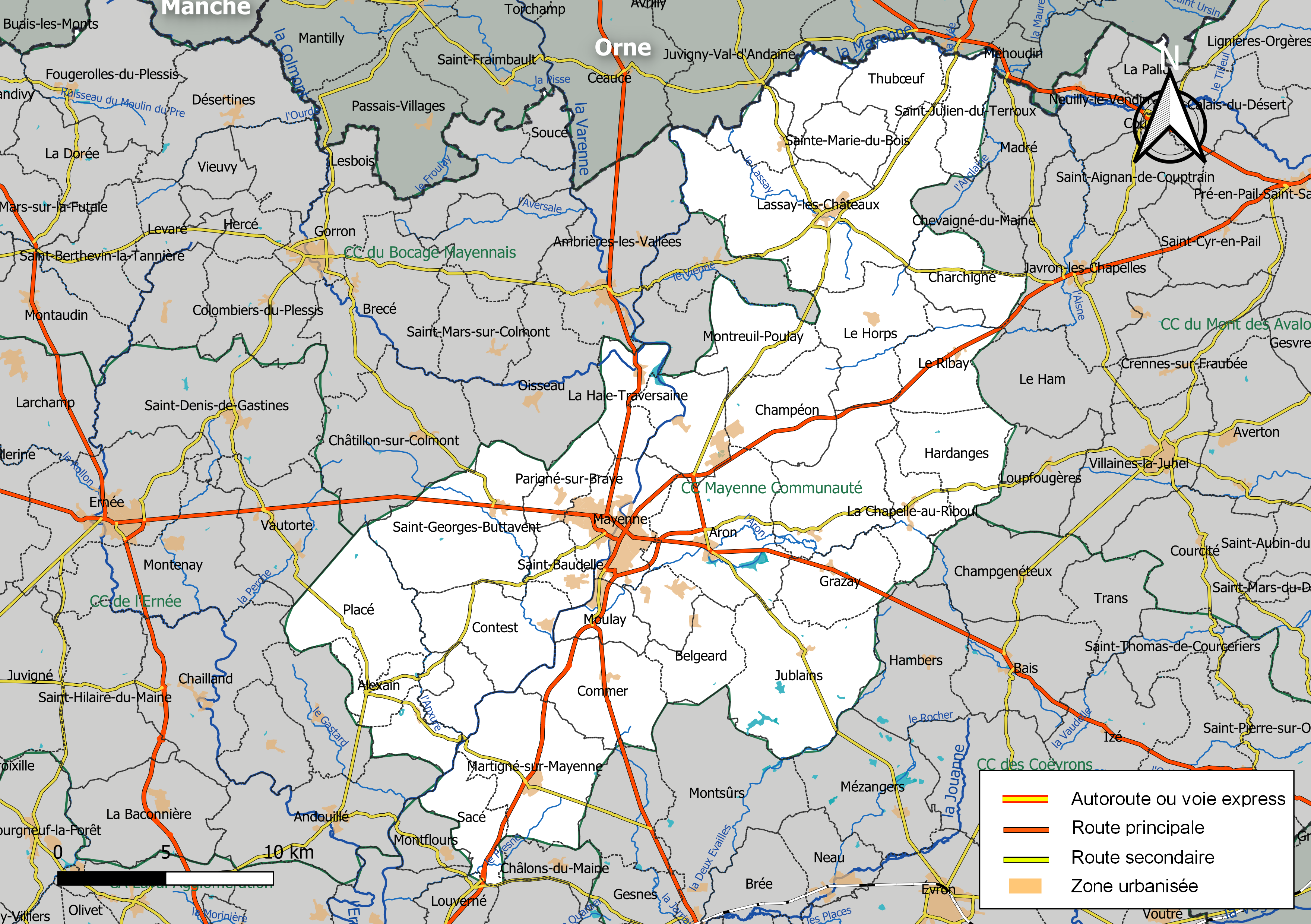 Carte géographique de la Communauté de communes Mayenne Communauté, département de la Mayenne, France. Composition au 1er janvier 2019.